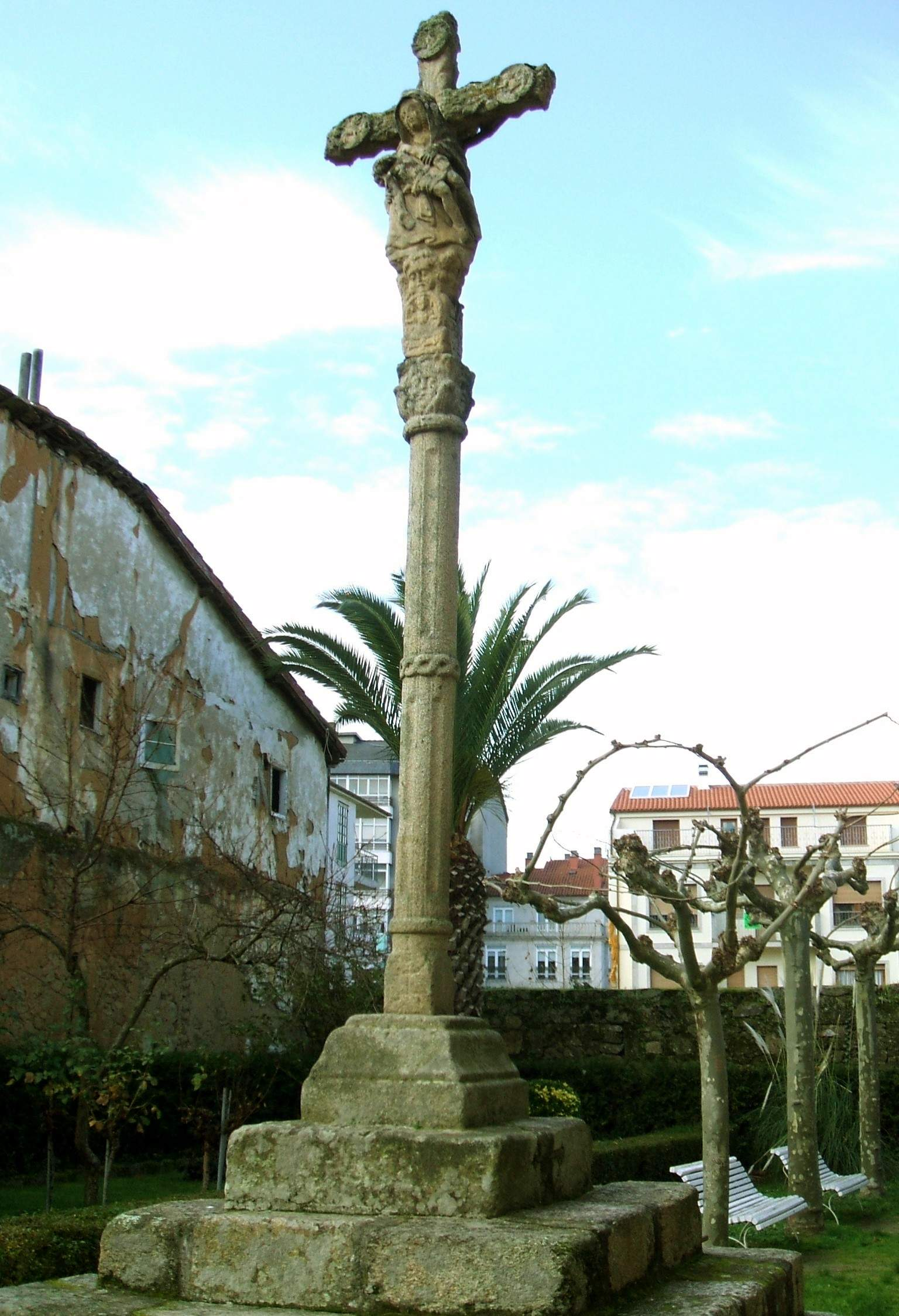 Crucero ante la iglesia de la Santísima Trinidad de Ourense, Galicia, España.